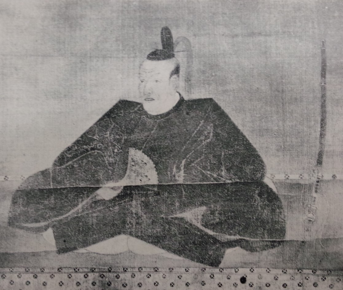 本多忠利の肖像。